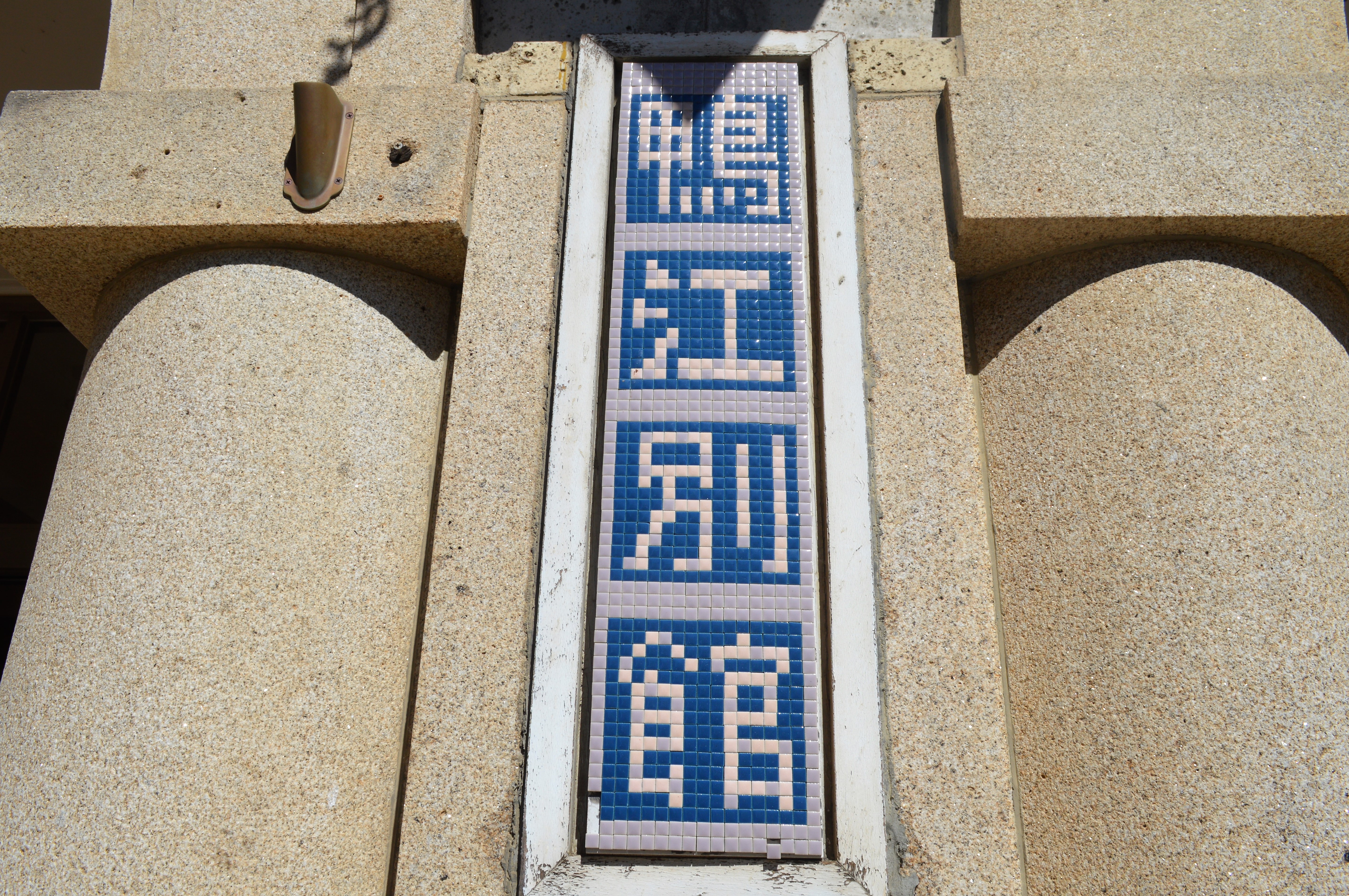 静岡県浜松市の鴨江アートセンター。旧浜松警察署。「鴨江別館」の看板。